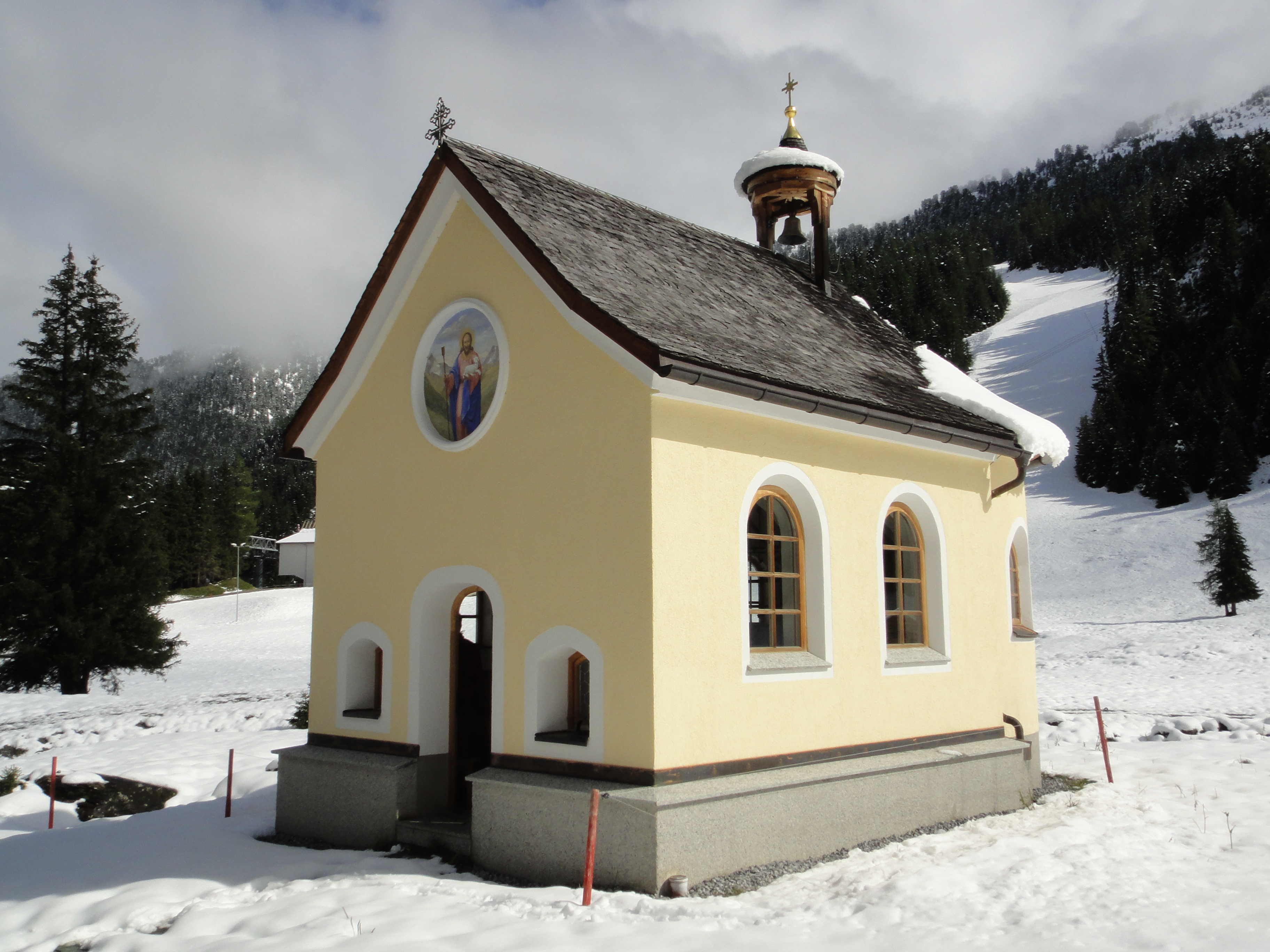 Kapelle hl. Gallus Oberpardatsch